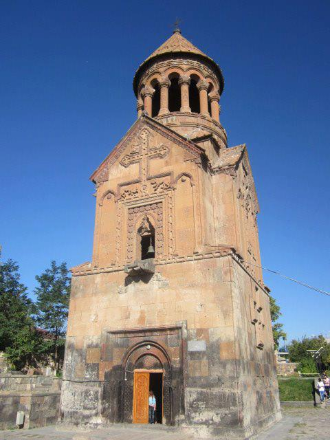 Կոտայքի մարզ քաղաք Եղվարդ